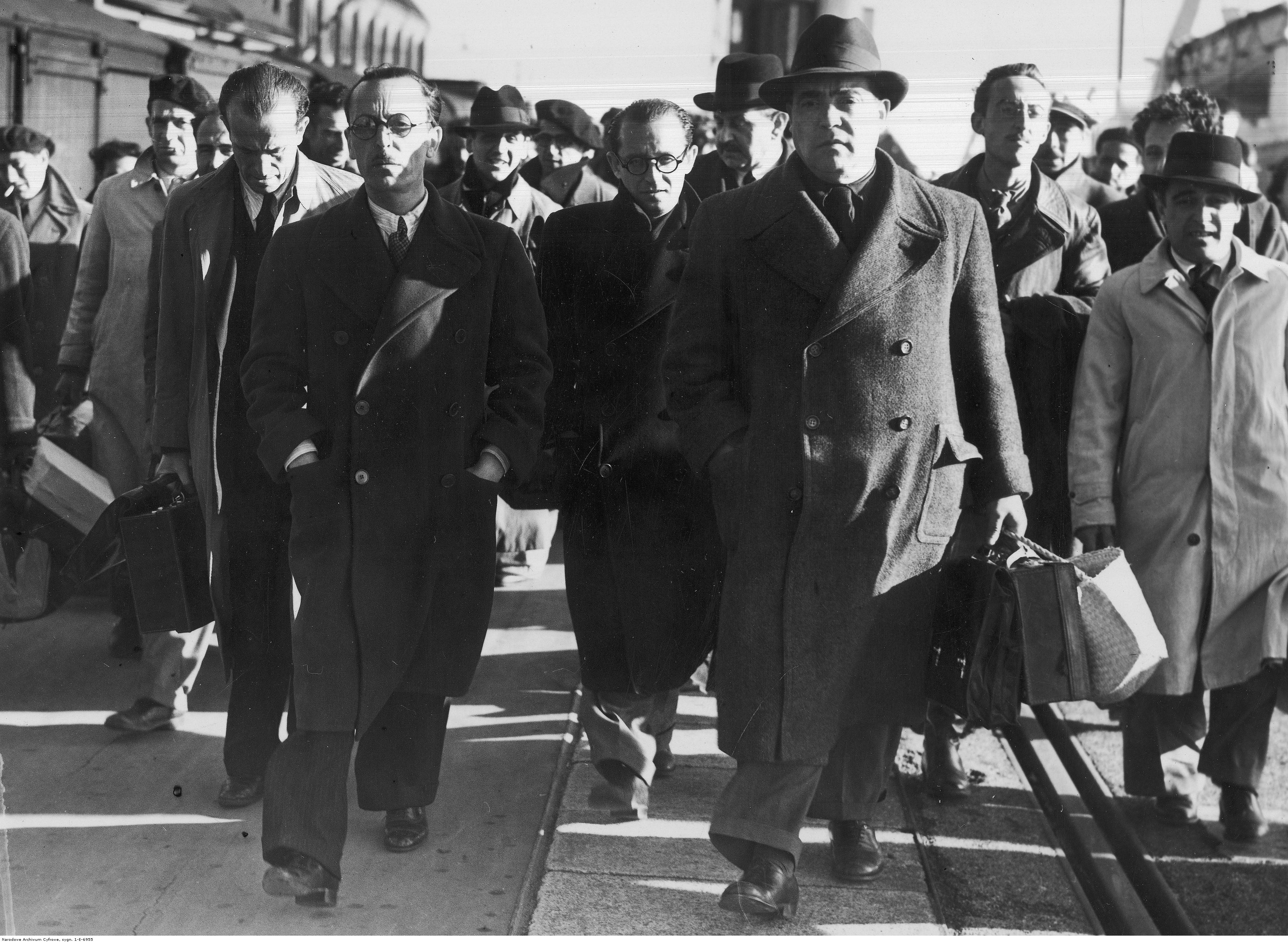 Los miembros del Consejo Nacional de Defensa a su llegada al Reino Unido. Visibles entre otros Segismundo Casado López (en la primera fila, a la izquierda) y Wenceslao Carrillo Alonso-Forjador (en primera fila, con sombrero).